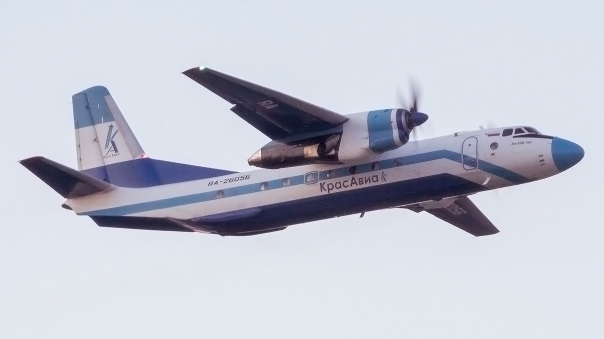 RA-26056 Antonov 26B-100 | Антонов 26Б-100 An-26B-100 | Ан-26Б-100 KrasAvia | КрасАвиа VKO | UUWW